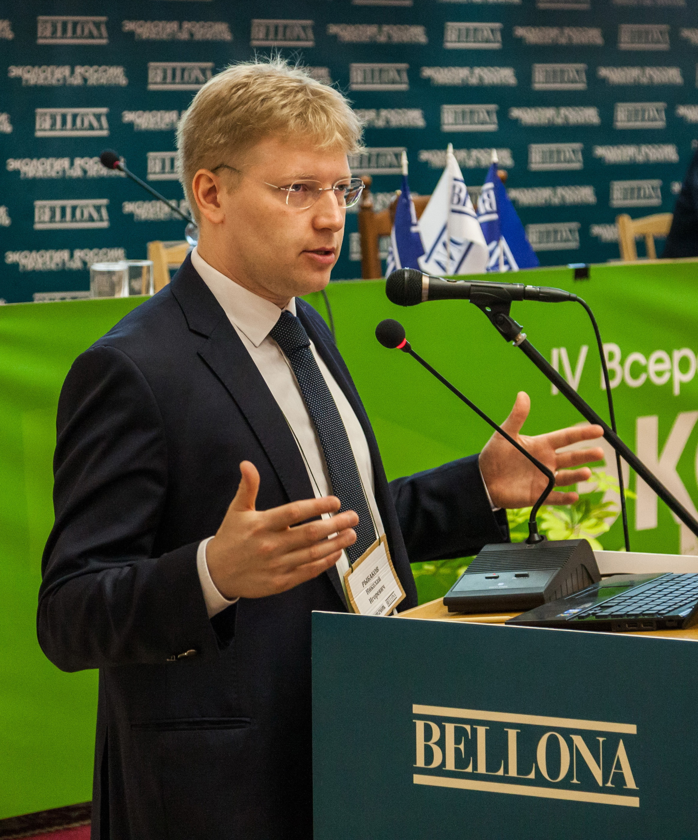 Николай Рыбаков на экологической конференции 30 мая 2014 года